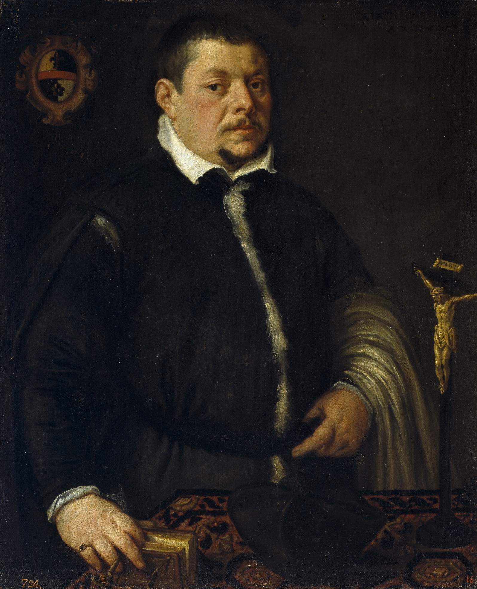 Leandro Bassano, Portrait d'un magistrat avec un crucifix (vers 1600), huile sur toile, 98 x 80 - Madrid, Museo Nacional del Prado